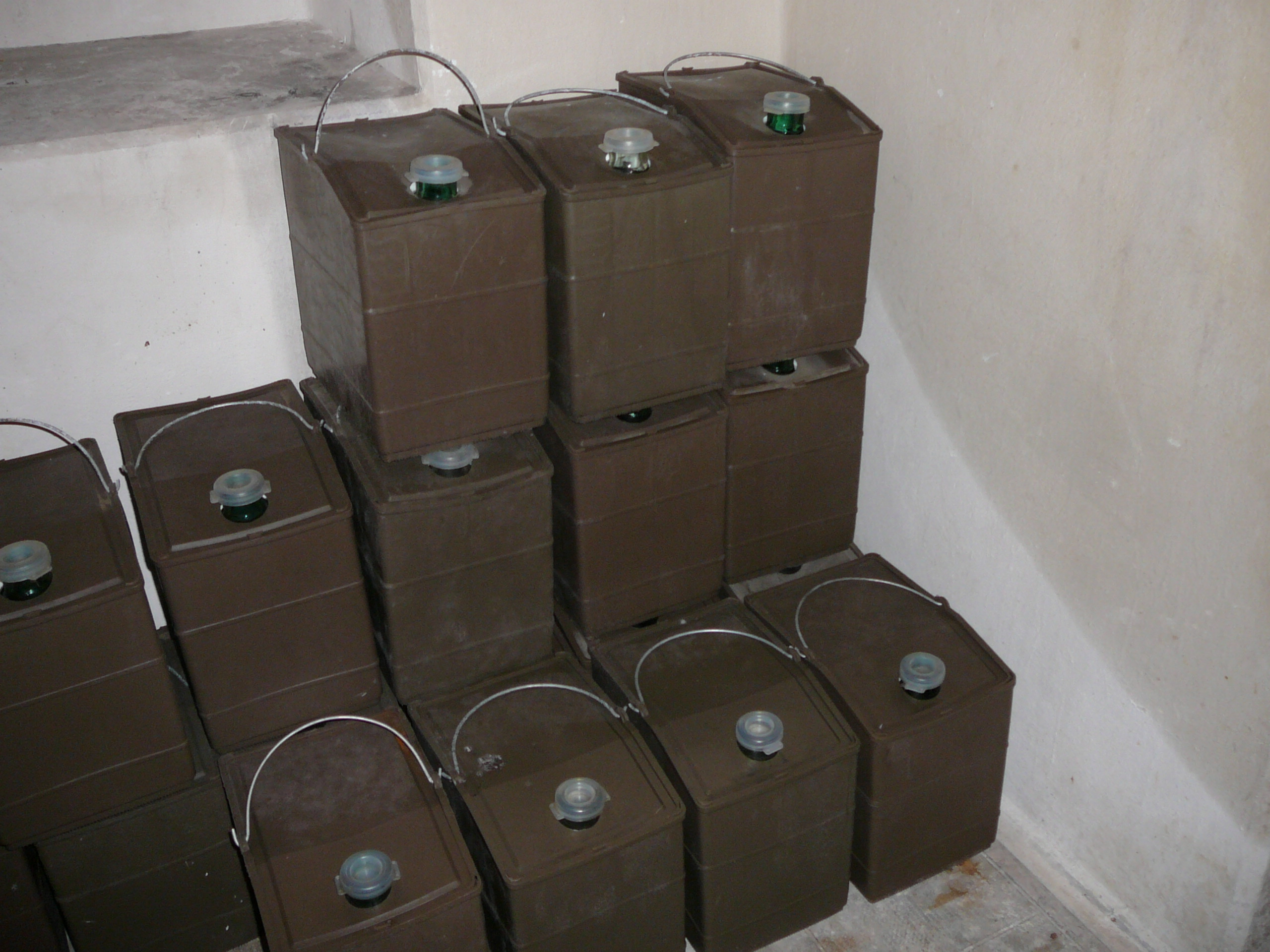 Taniche acqua potabile Vallo Alpino